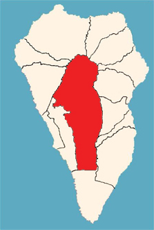 Localización geografica de El Paso